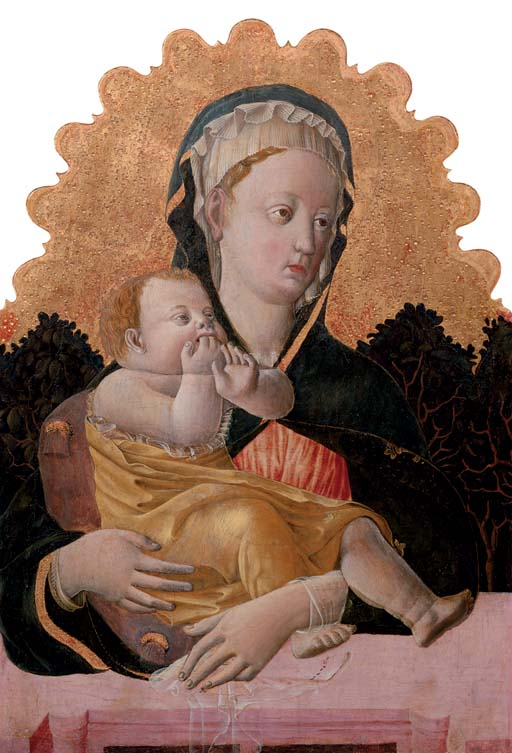 Francesco Squarcione Padua c. 1395-after 1468. The Madonna and Child. tempera and gold on panel, 23 3/8 x 17 7/8 in. 59.3 x 45.4 cm This fascinating Madonna and Child has attracted the attention of scholars of Paduan art since 1889 when it was first published as a work by Giorgio Schiavone, a view followed by Berenson in 1907.